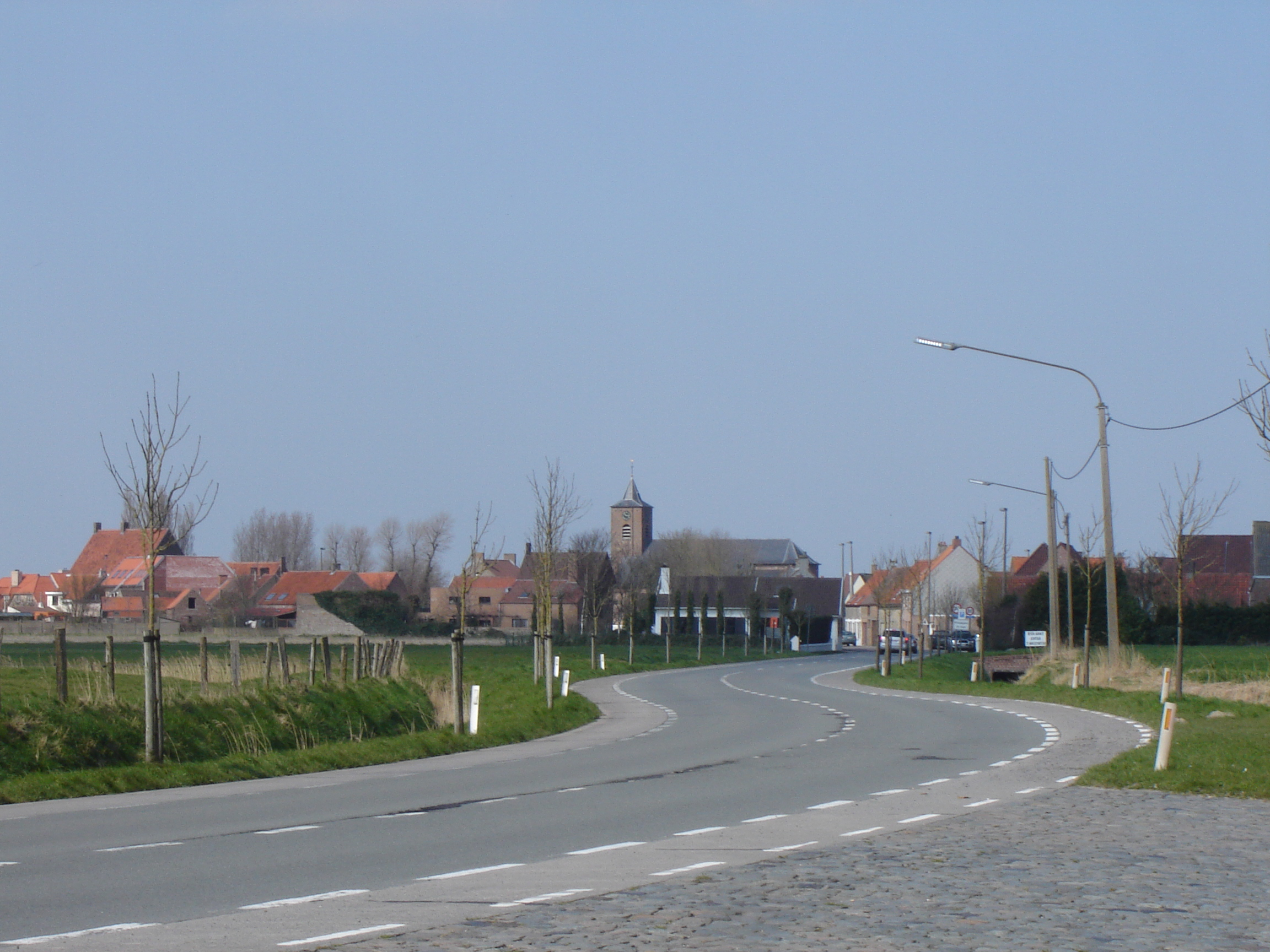 Uitzicht op Vlissegem (bij het naderen vanuit het zuiden via de Vijfwegestraat) View on the village of Vlissegem, De Haan, West Flanders, Belgium